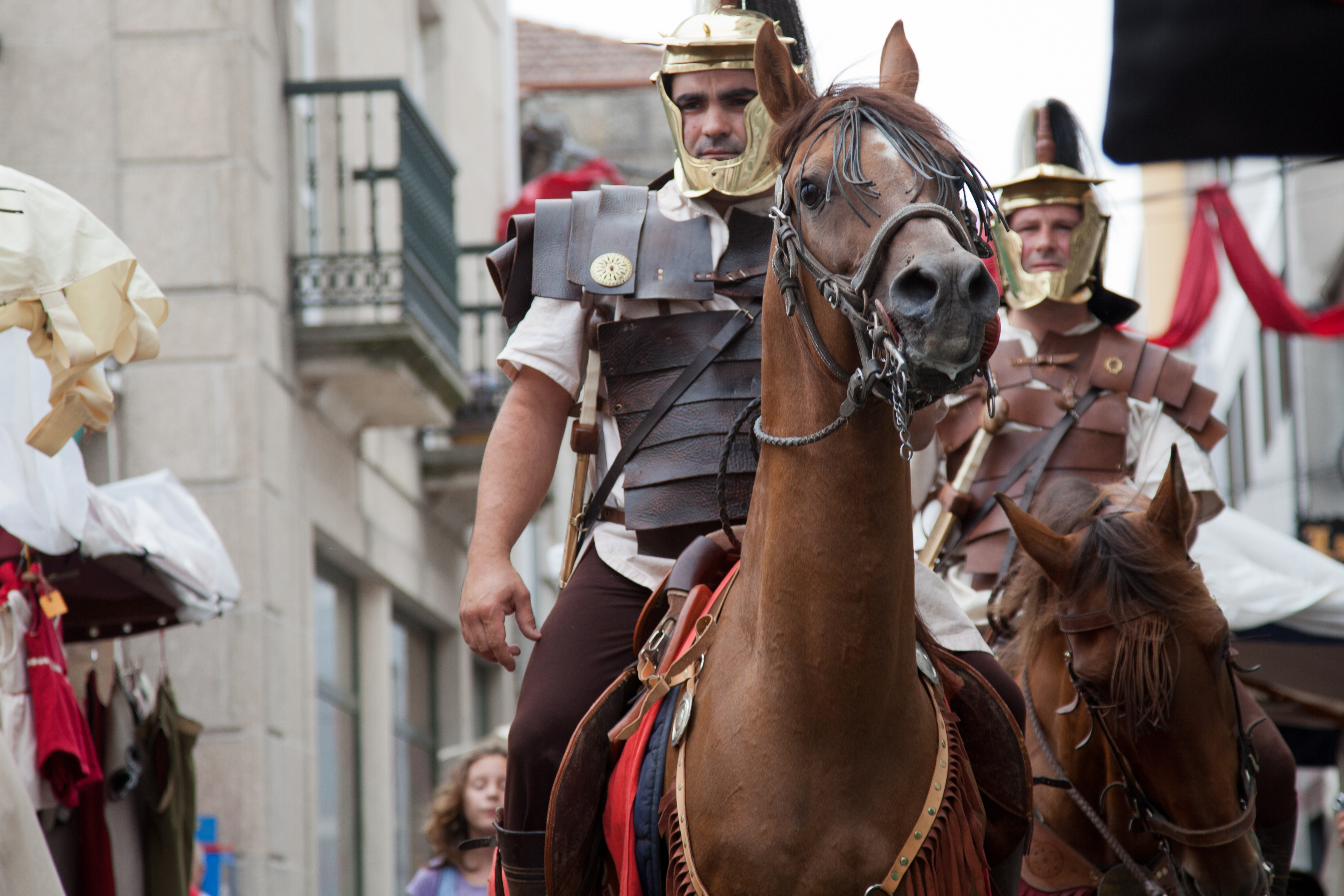 Equites. Festa do esquecemento. 2011. Xinzo de Limia